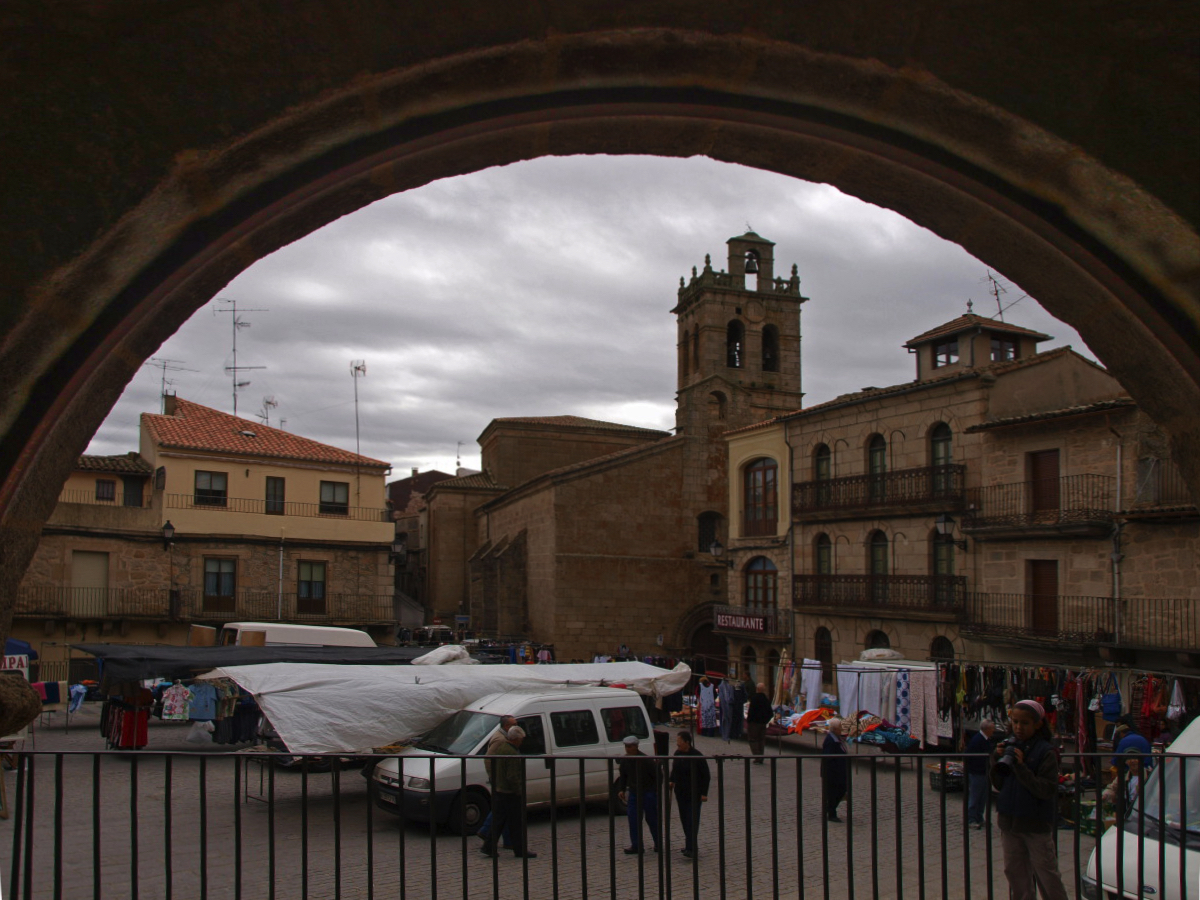 La plaza mayor de Fermoselle desde uno de sus arcos, Zamora, España